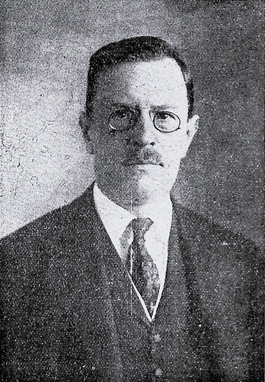 Paul von Bongardt, Direktor des Lübecker Stadttheaters von 1918 bis 1923.